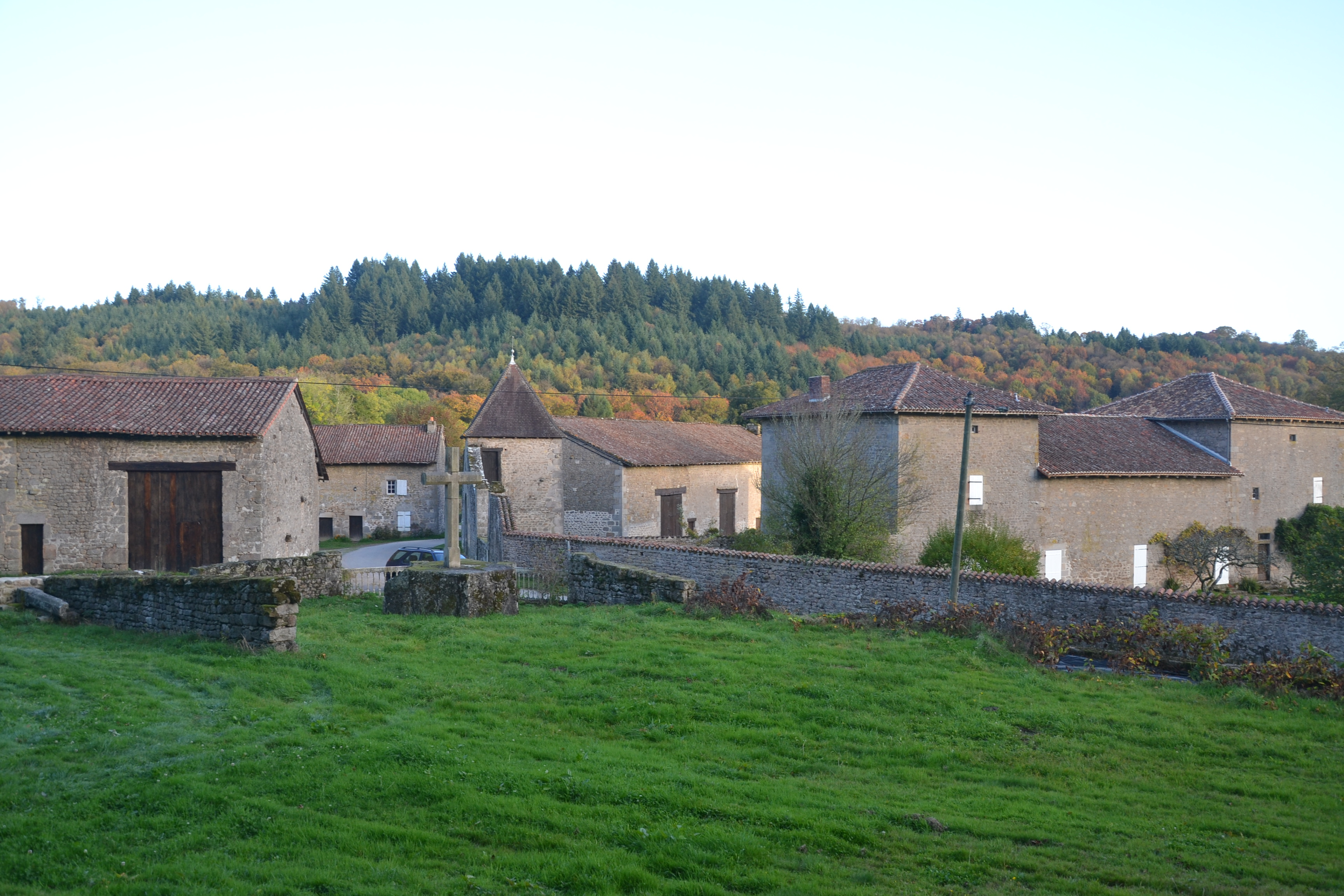 Le village de Salesse (Bonnac-la-Côte, Haute-Vienne, France).